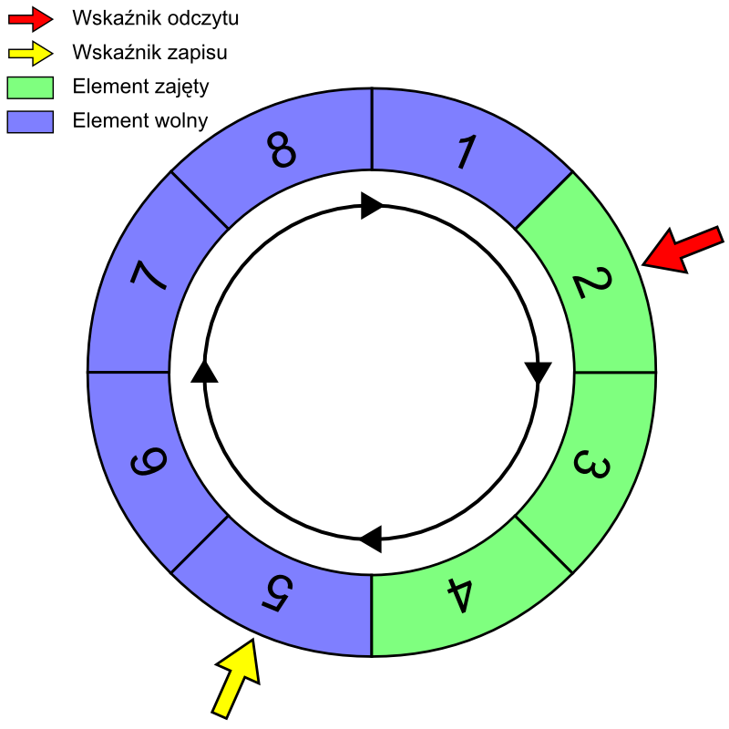 Rysunek ilustrujący zasadę działania bufora cyklicznego